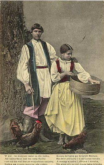 Galicja, Poles, old post card